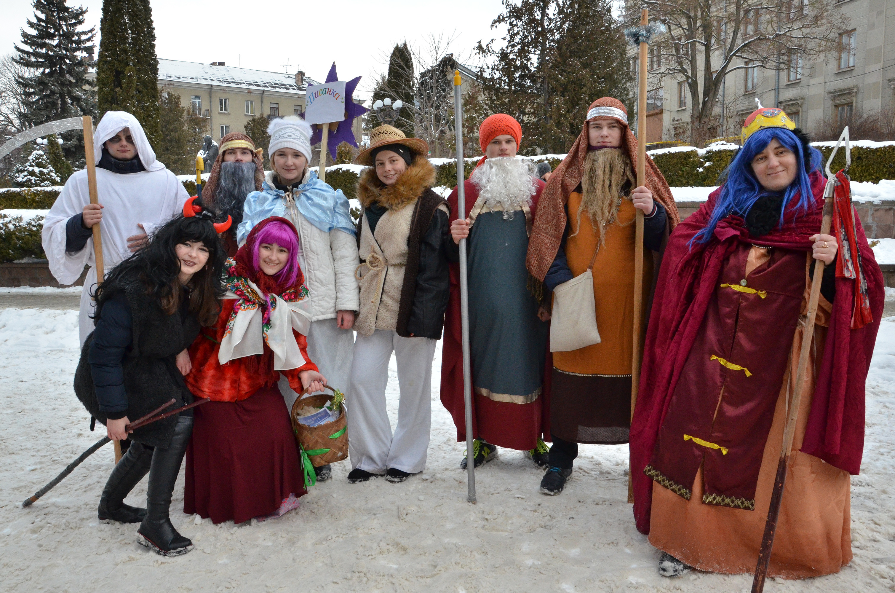 Дитячий театральний колектив «Писанка» із с. Мовчанівки Підволочиського району на параді вертепів у Тернополі 15 січня 2017 року.